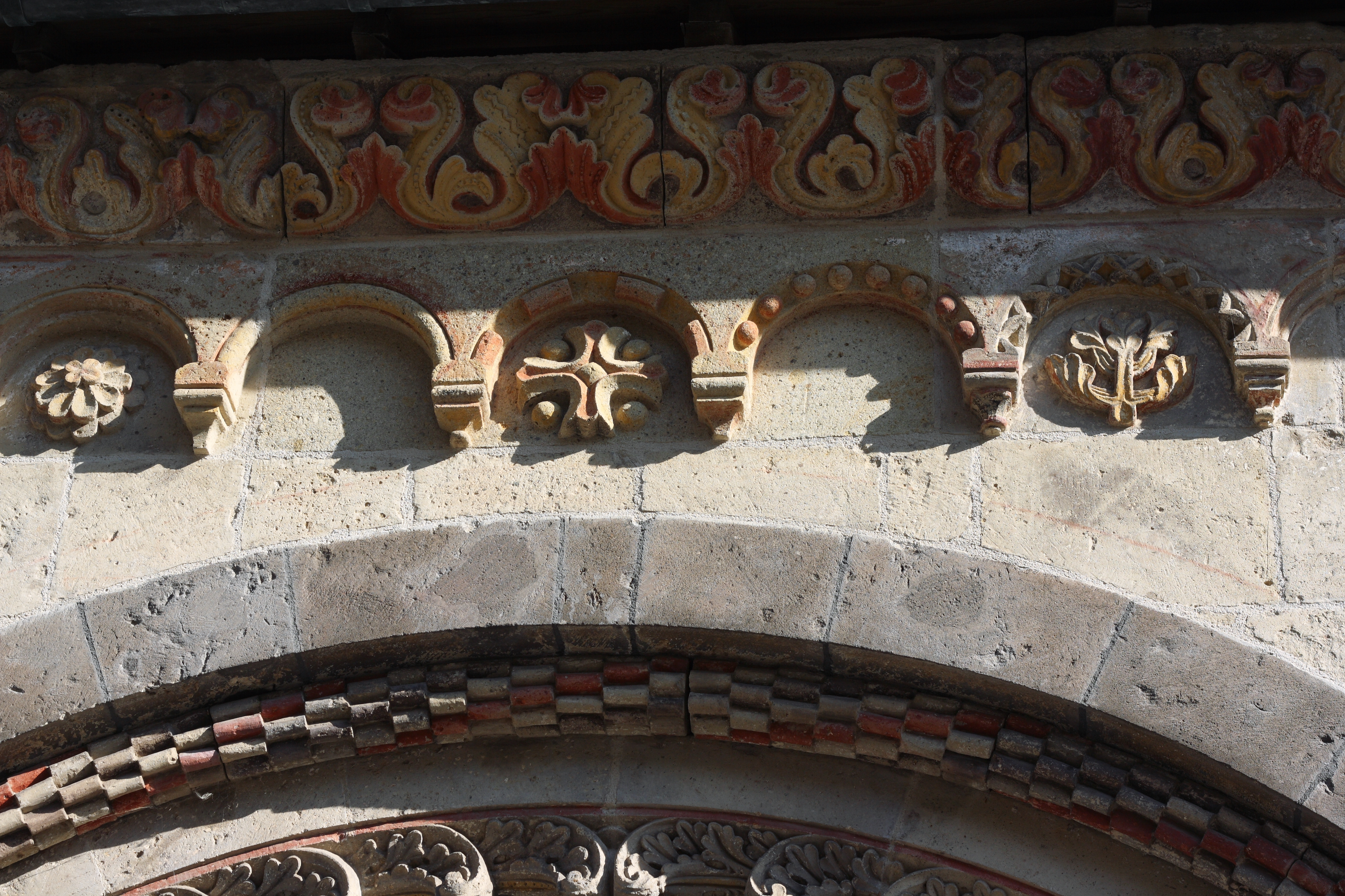 Bogenfries an der Vorhalle der Abtei Maria Laach